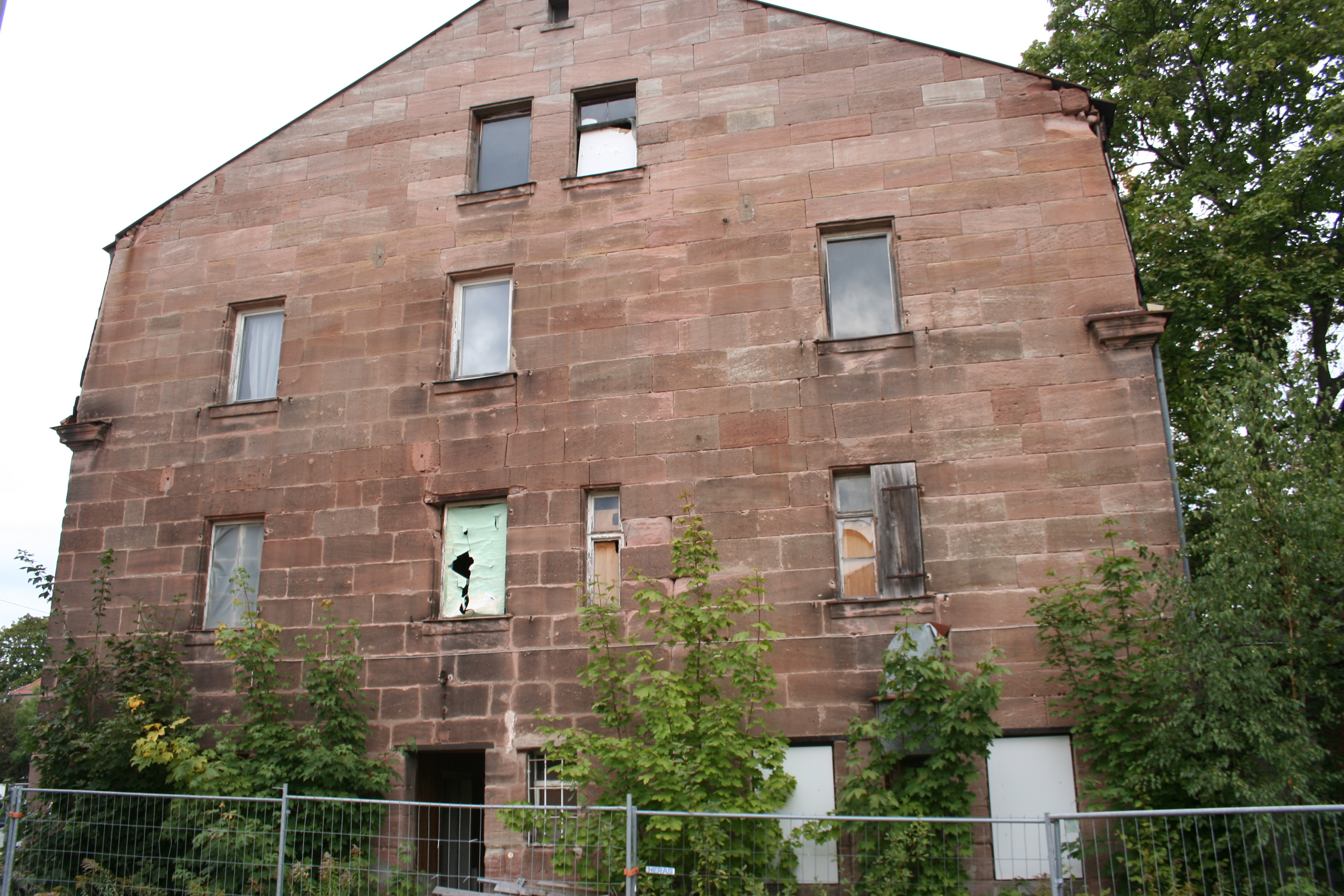 Gasthaus, zweigeschossiger Sandsteinquaderbau mit Mansardgiebeldach, im Kern 17./18. Jahrhundert, dendro.dat. 1616, Umbau und Mansarddachausbau von Johann Carl, 1891, bez. 1892